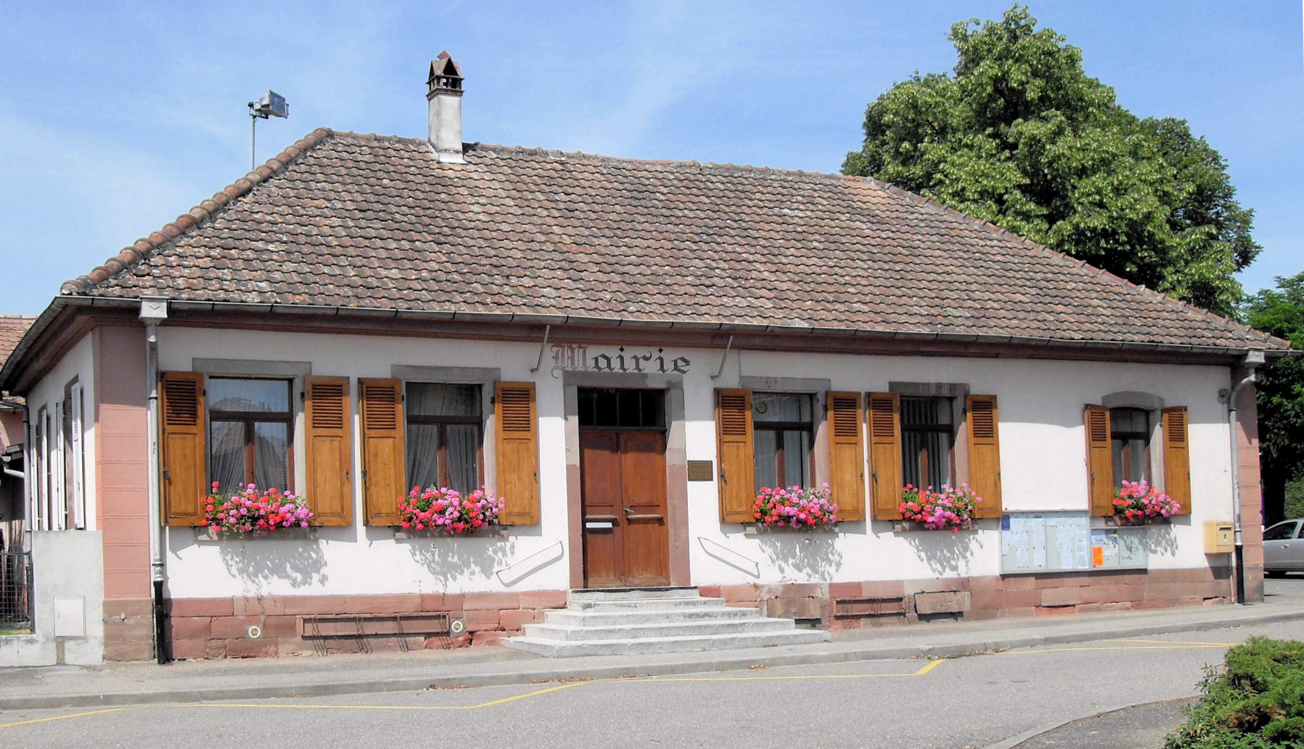 La mairie de Balgau